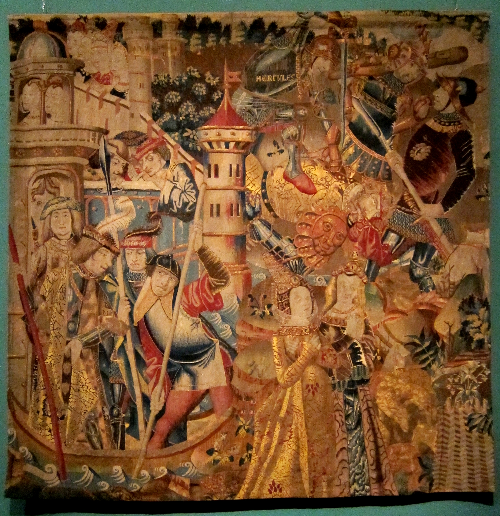 La vie d'Hercule, tapisserie de Tournai du XVème siècle au musée de la tapisserie de Tournai.